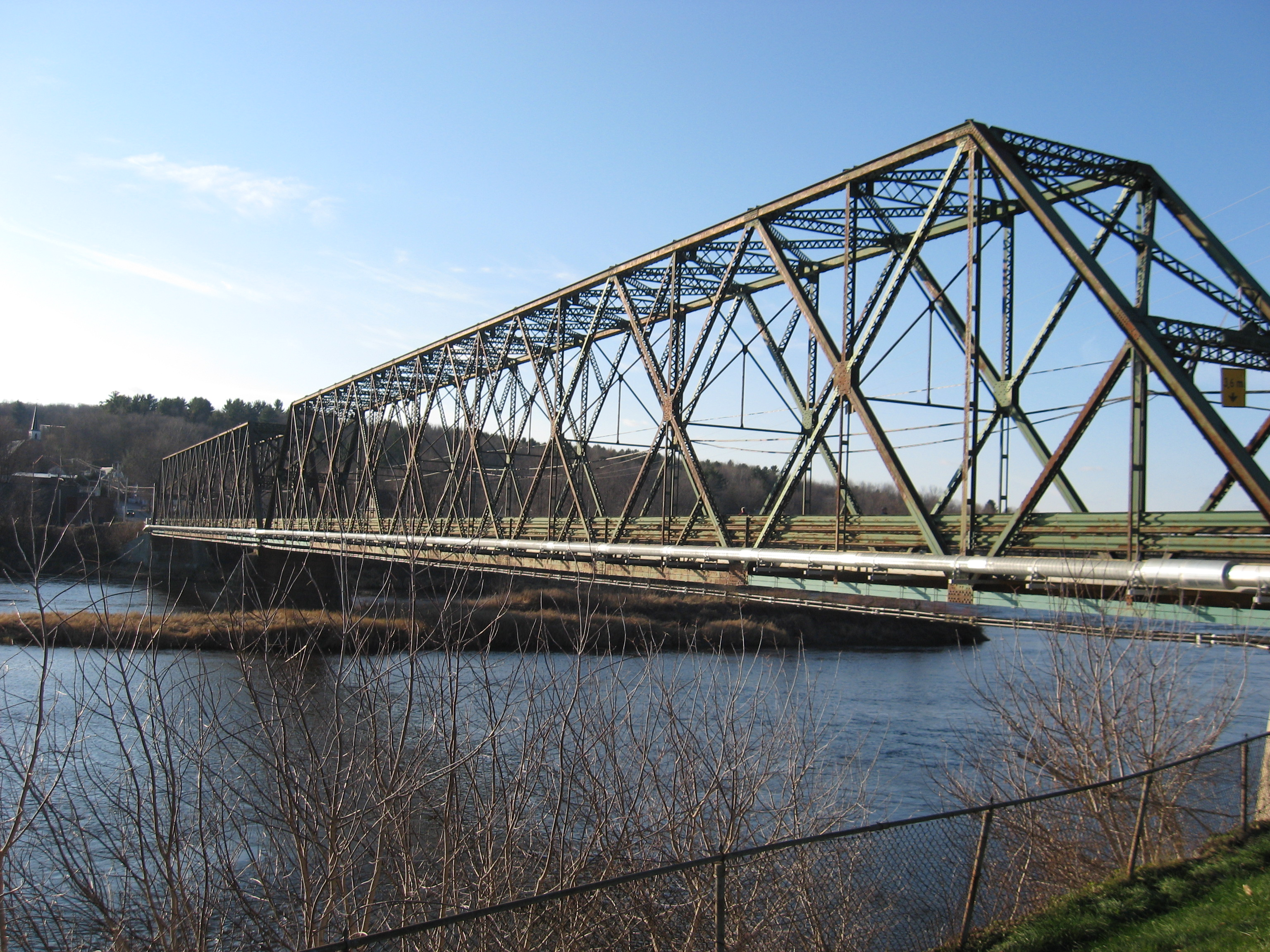 Pont Mackenzie